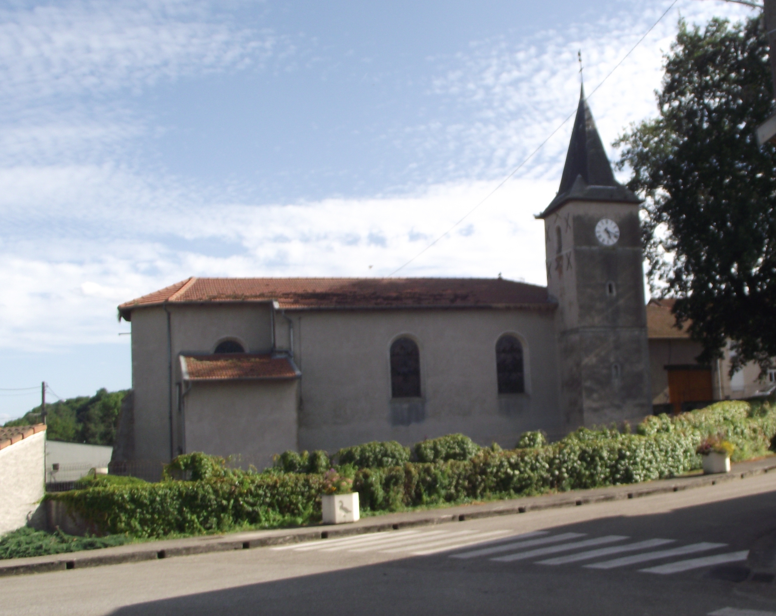 Eglise Saint Léger